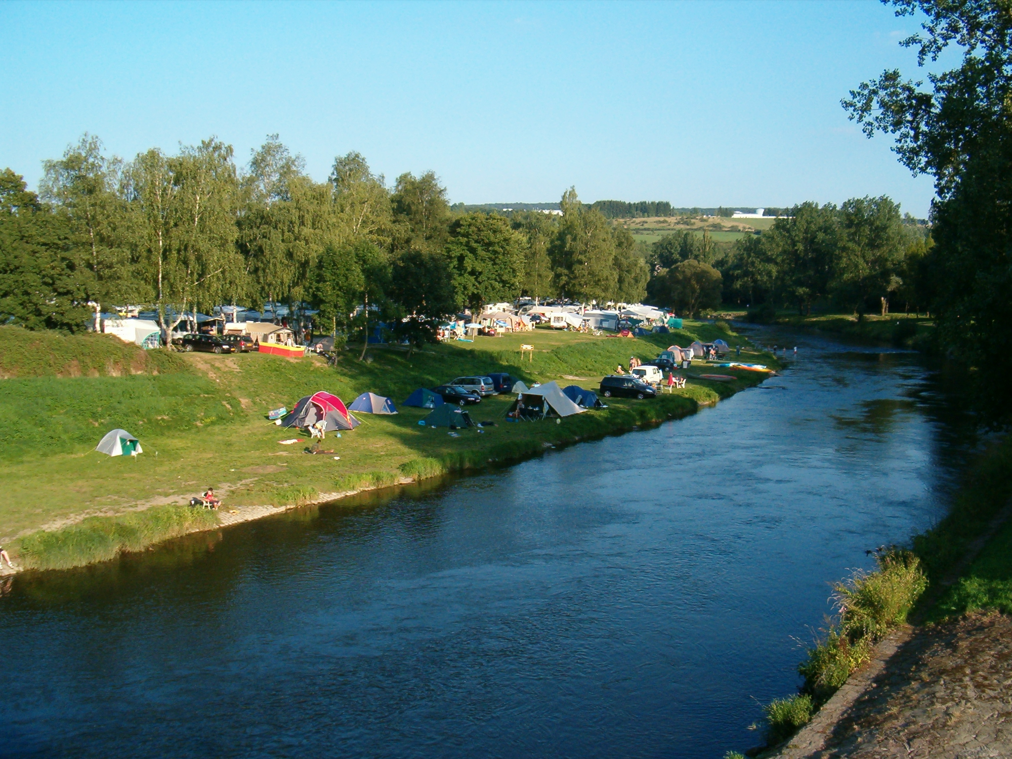 Echternach - camping - 2005